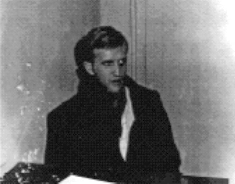 снимка в досието на Александър Димитров от 1968г.